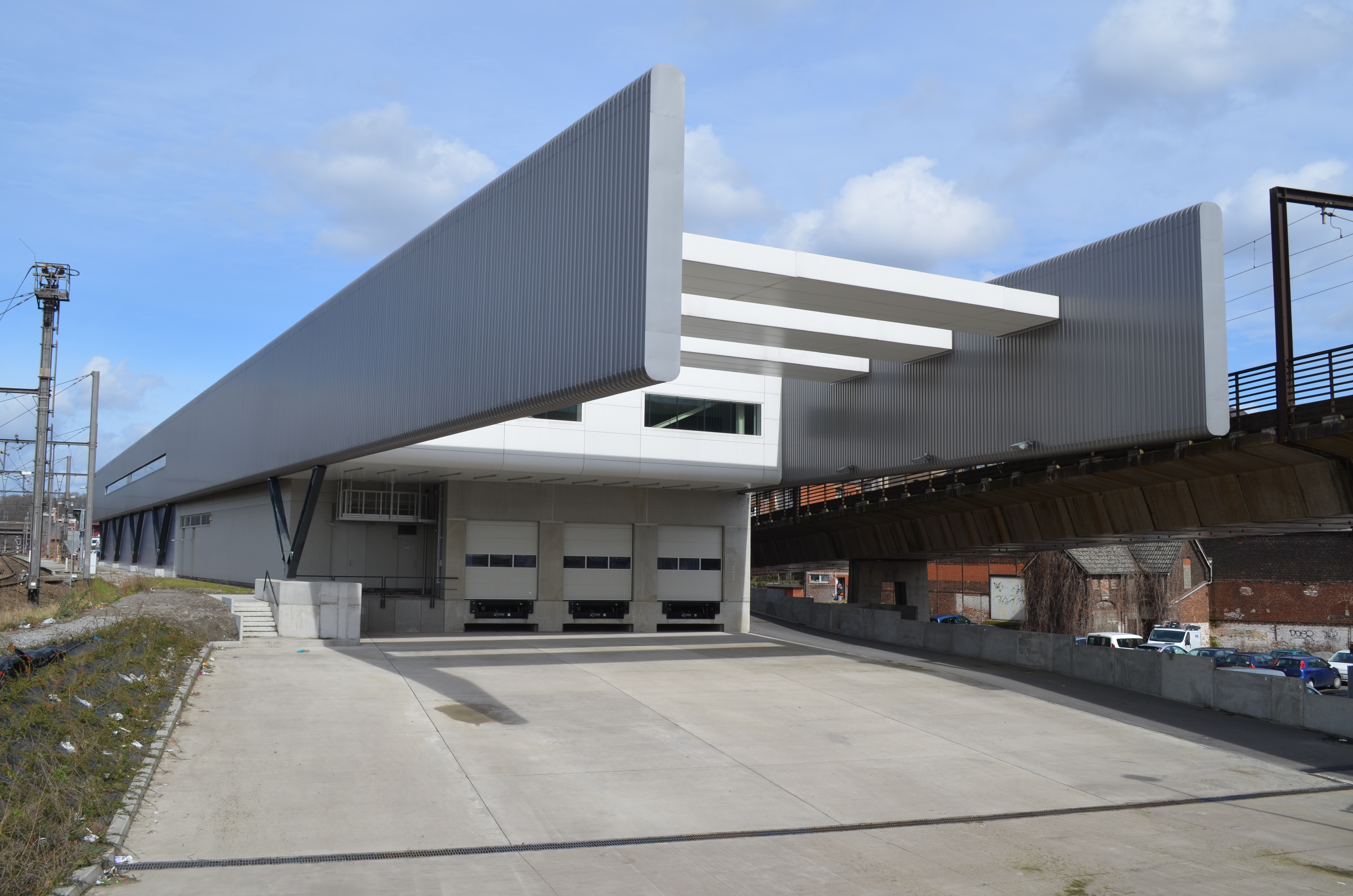 Charleroi (Belgique) - Centre de distribution urbaine. Vu de depuis la rue du Rivage.